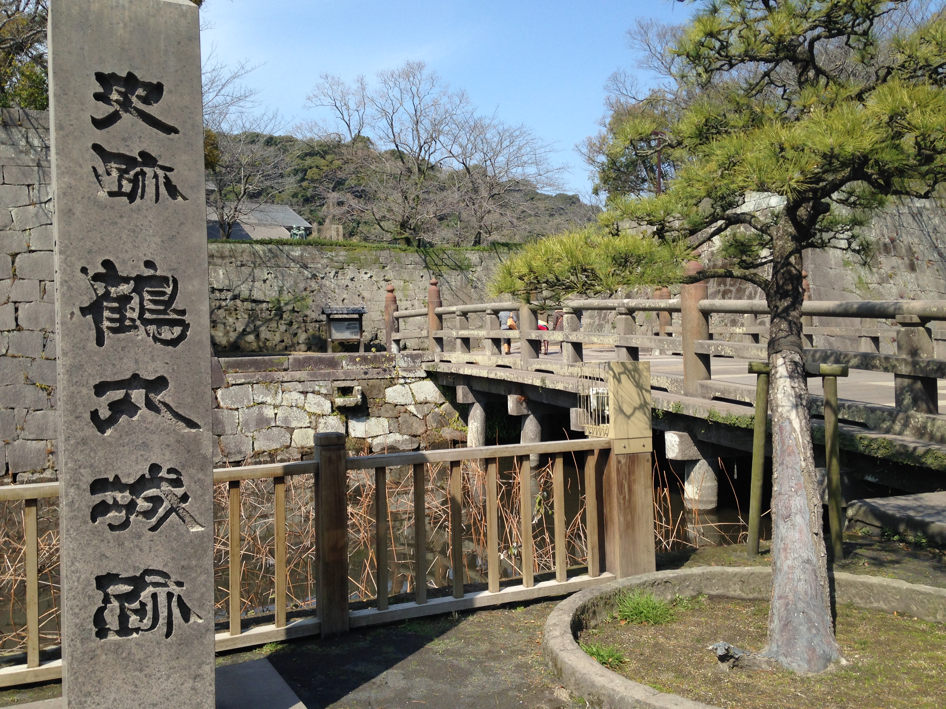 鶴丸城跡の入り口